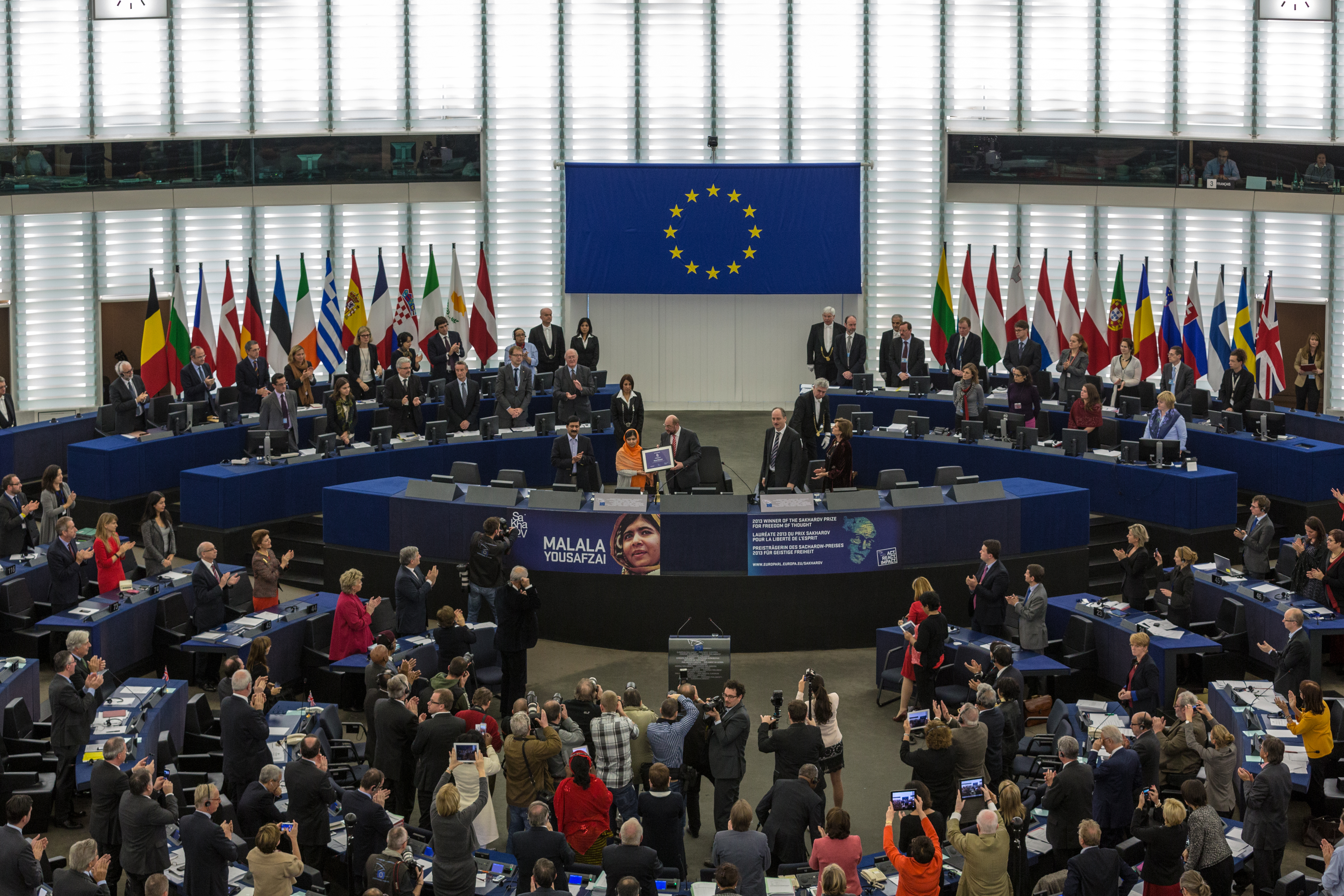 Remise du Prix Sakharov à Malala Yousafzai Strasbourg 20 novembre 2013